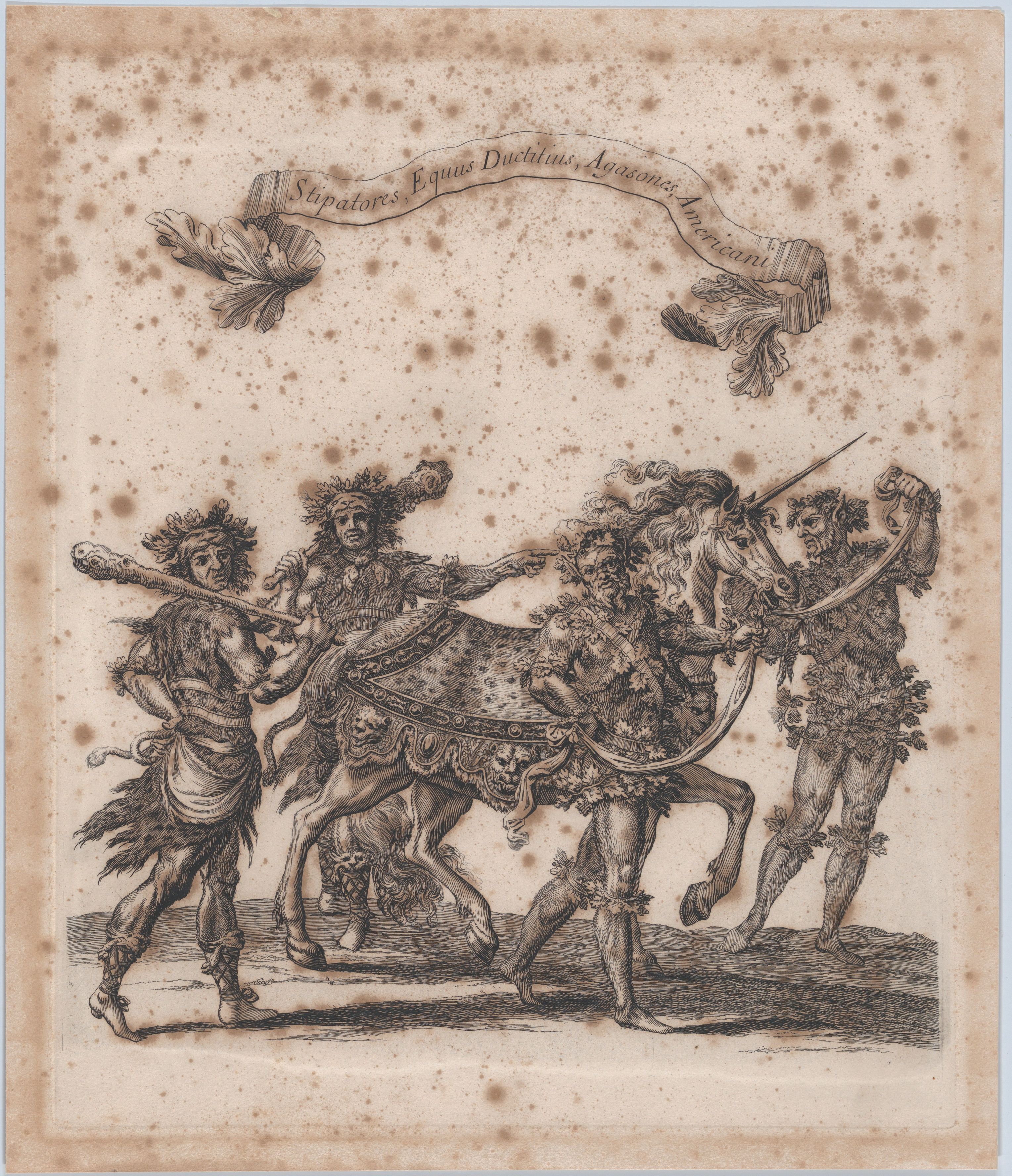 Prints-Fete